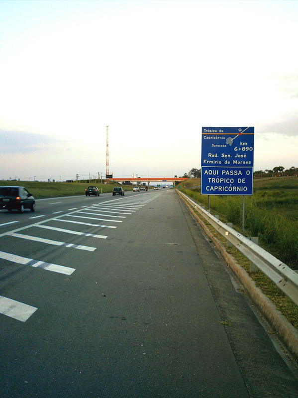 Indicação do Trópico de Capricórnio junto à Rodovia Sen. José Ermirio de Moraes, próximo à Sorocaba, SP - Brasil